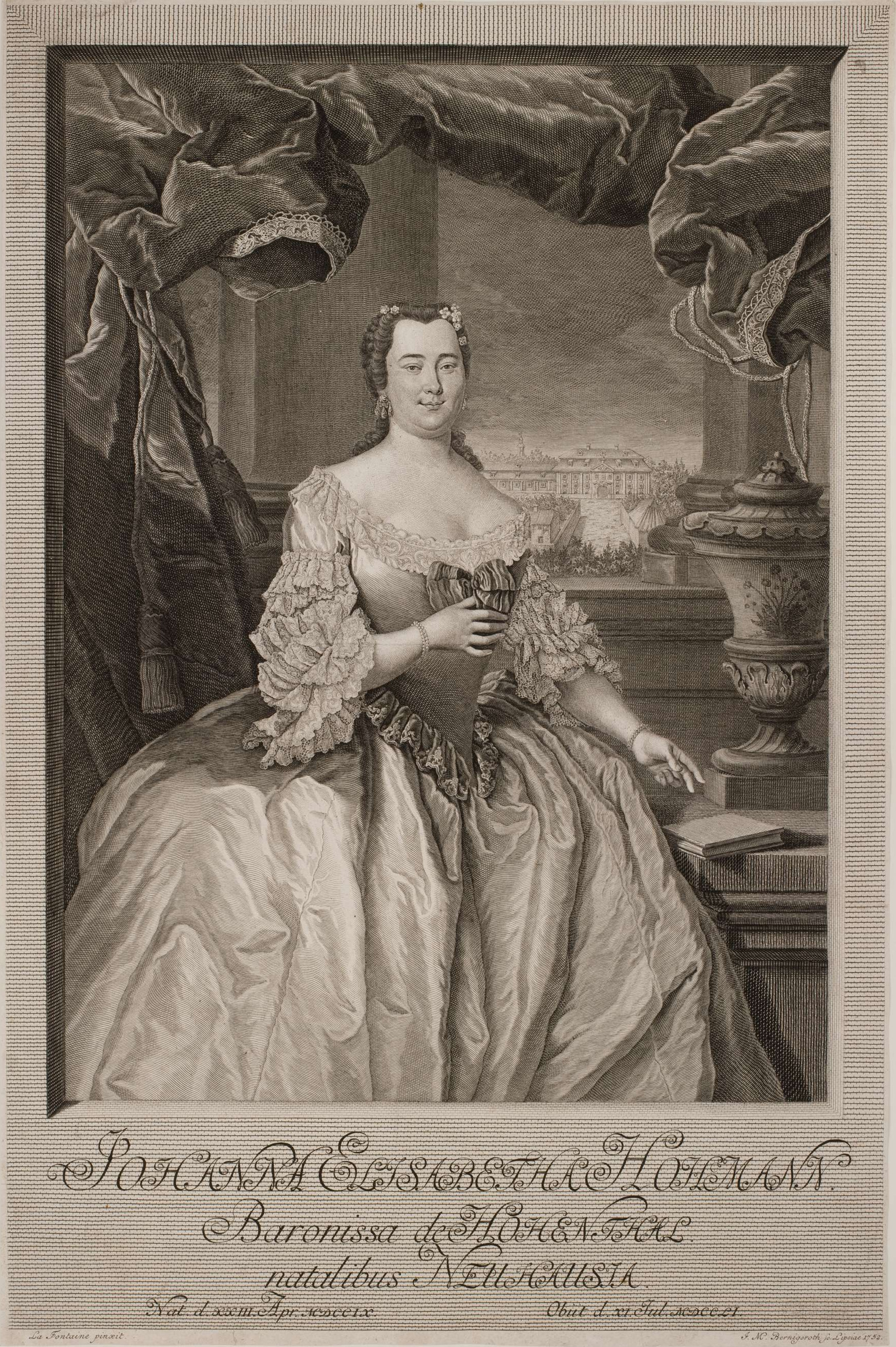 Johanna Elisabeth Hohmann von Hohenthal, lebte 1709–1751, verheiratet mit Christian Gottlieb von Hohenthal (1701-1763)